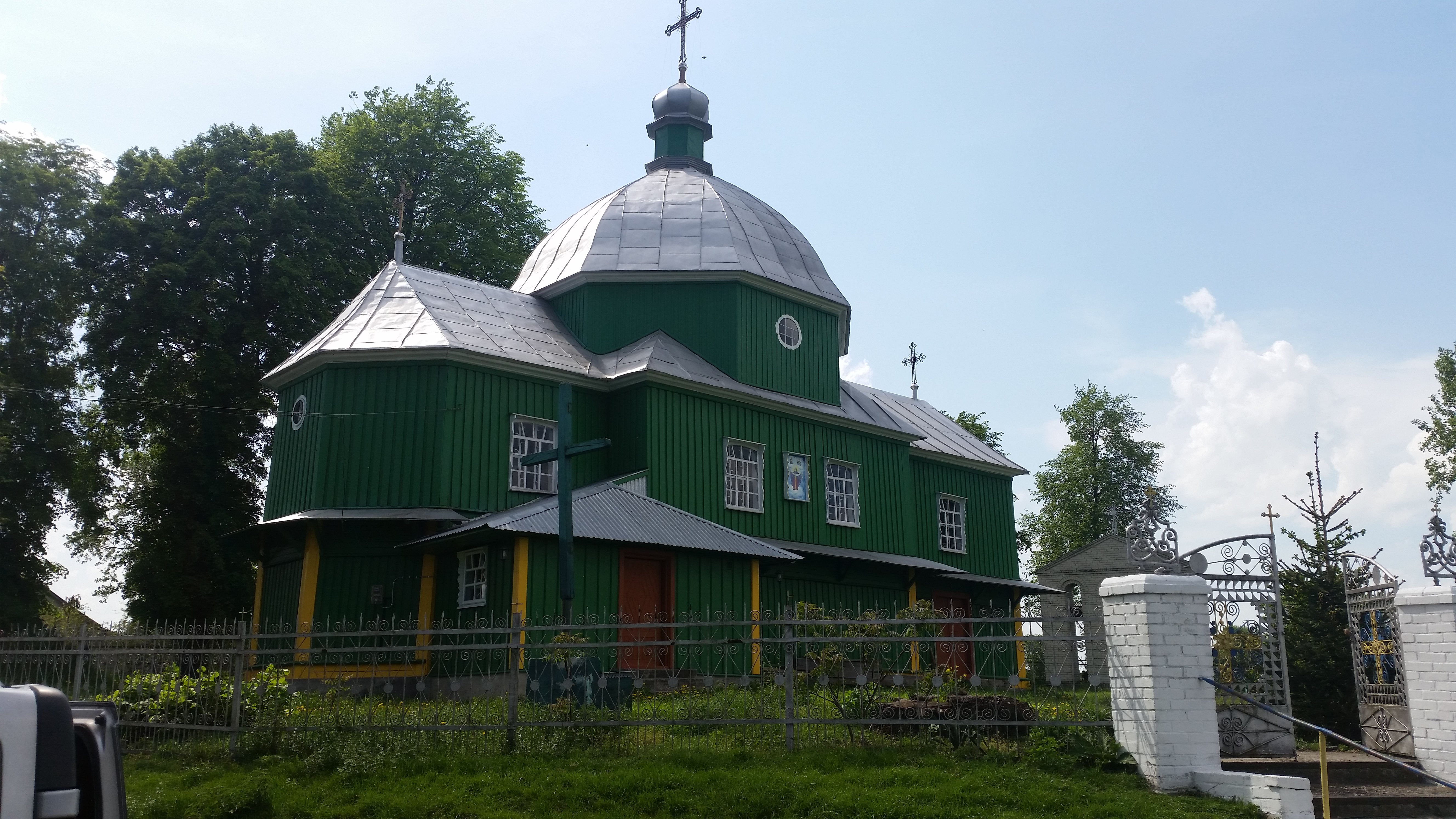 Дерев'яна церква Покрови Пресвятої Богородиці в с. Старгород, зведена у 1892 р.